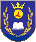 Stary herb gminy Lubaczów